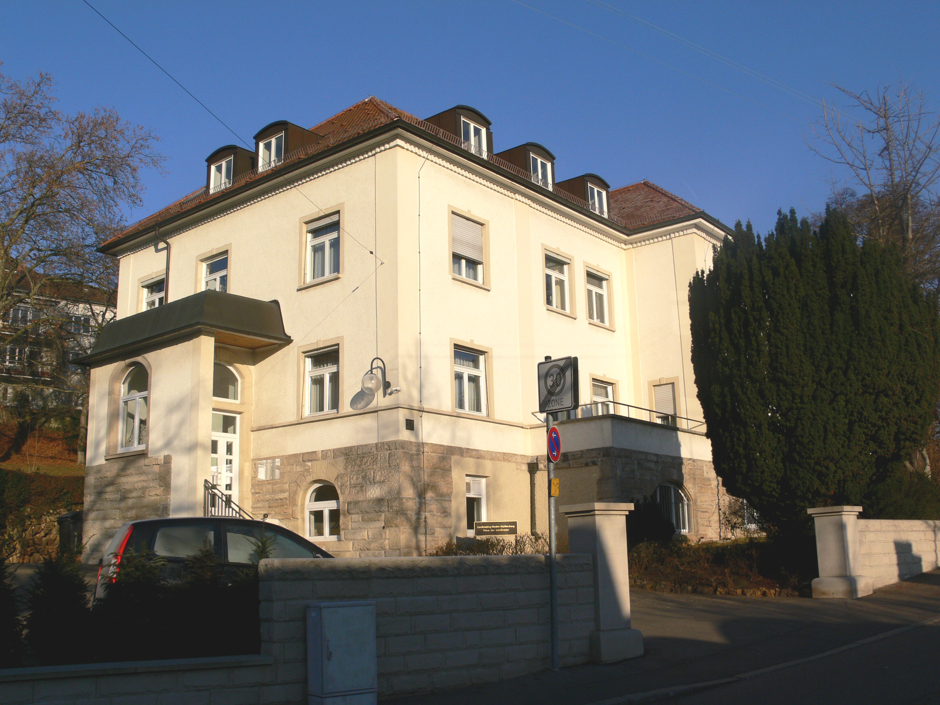 Landkreistag Baden-Württemberg, Panoramastraße 37, 70174 Stuttgart (Stuttgart-Nord)